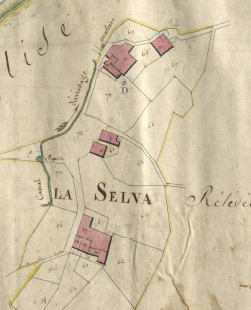 La Selva, de les Illes, en el Cadastre napoleònic del 1812 (Arxius Departamentals dels Pirineus Orientals)